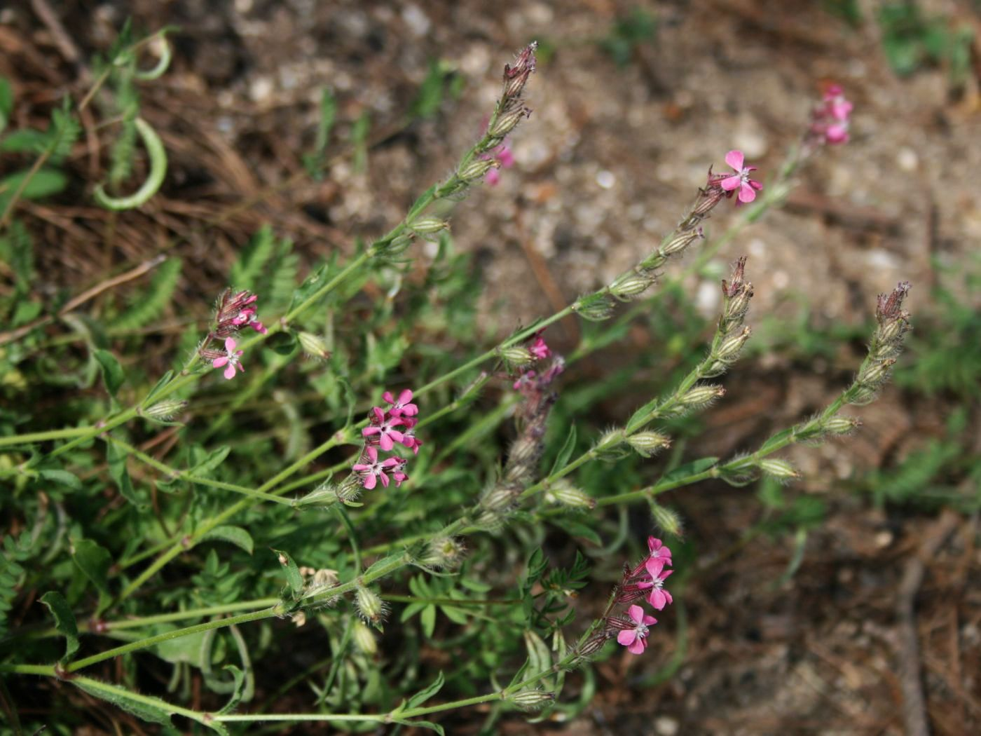 Silene gallica, Nelkengewächse (Caryophyllaceae) - Italien/Italia/Italy: Kalabrien/Calabria, Prov. Reggio Calabria, Aspromonte, bei San Peri, SSE Scilla